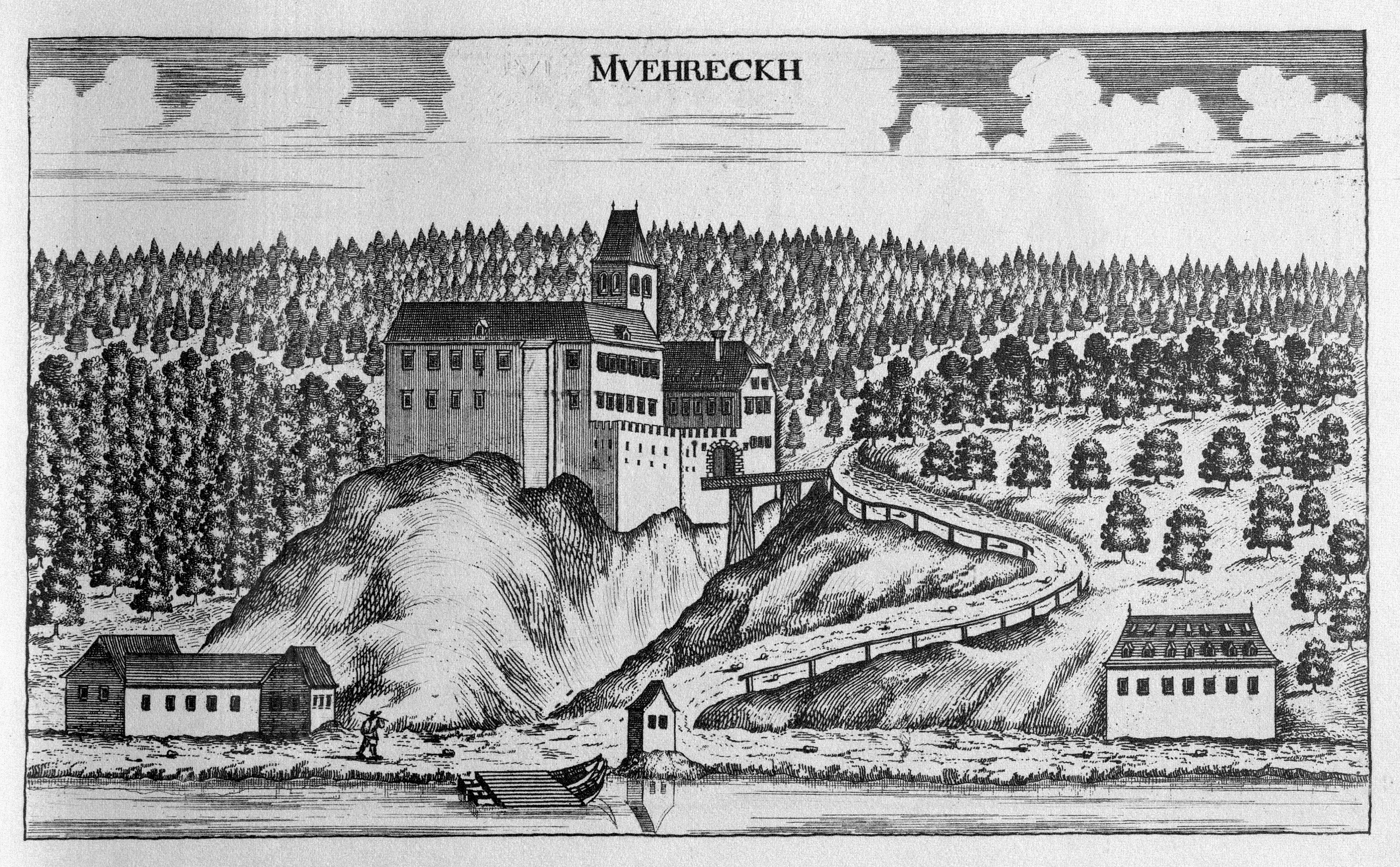 G. M. Vischers Käyserlichen Geographi, Topographia Ducatus Stiriae, Das ist: Eigentliche Delineation / und Abbildung aller Städte / Schlösser / Marcktfleck / Lustgärten / Probsteyen / Stiffter / Clöster und Kirchen / so es sich im Herzogthumb Steyrmarck befinden; Und anjetzo Umb einen billichen Preyß zu finden seynd Bey Johann Bitsch Universitäts Buchhandlern / Auff dem Juden=Platz bey der guldenen Saulen. Graz 1681 Die Nummerierung der Dateien folgt der alphabetischen Reihung der Ortsnamen